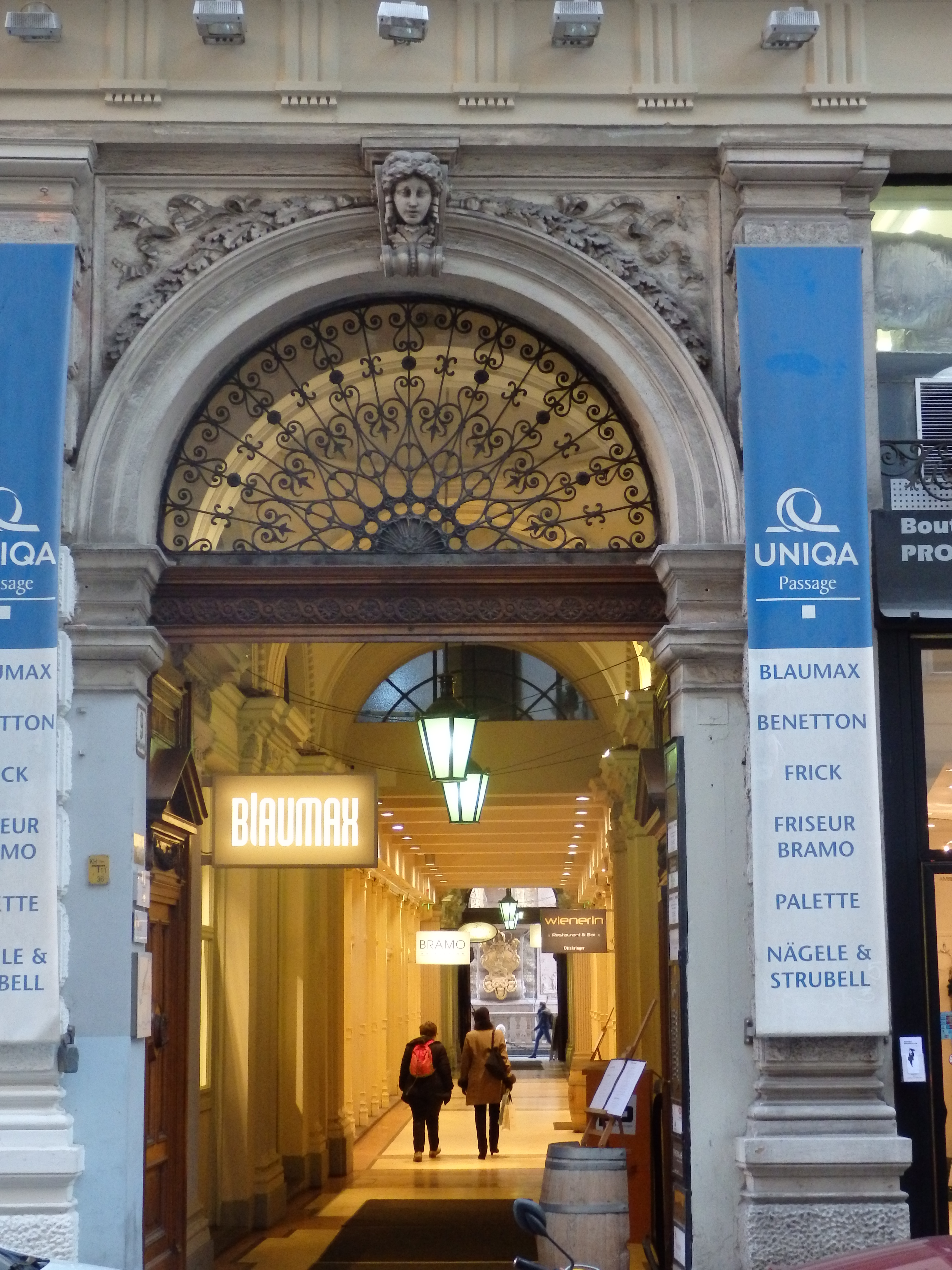 Durchgang, Goldschmiedgasse 9, Wien-Innere Stadt